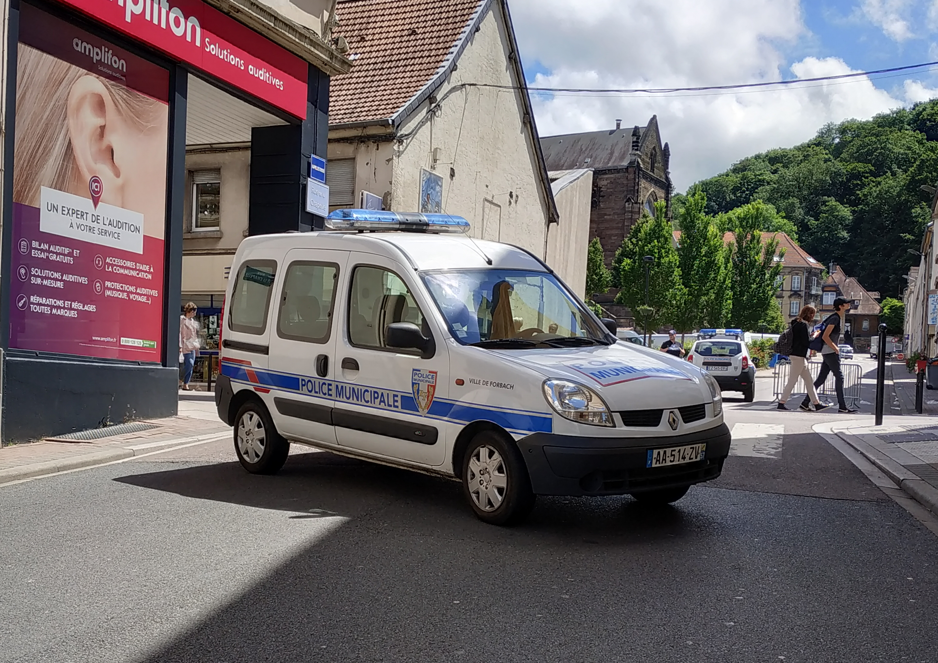 Renault Kangoo de la police municipale de Forbach